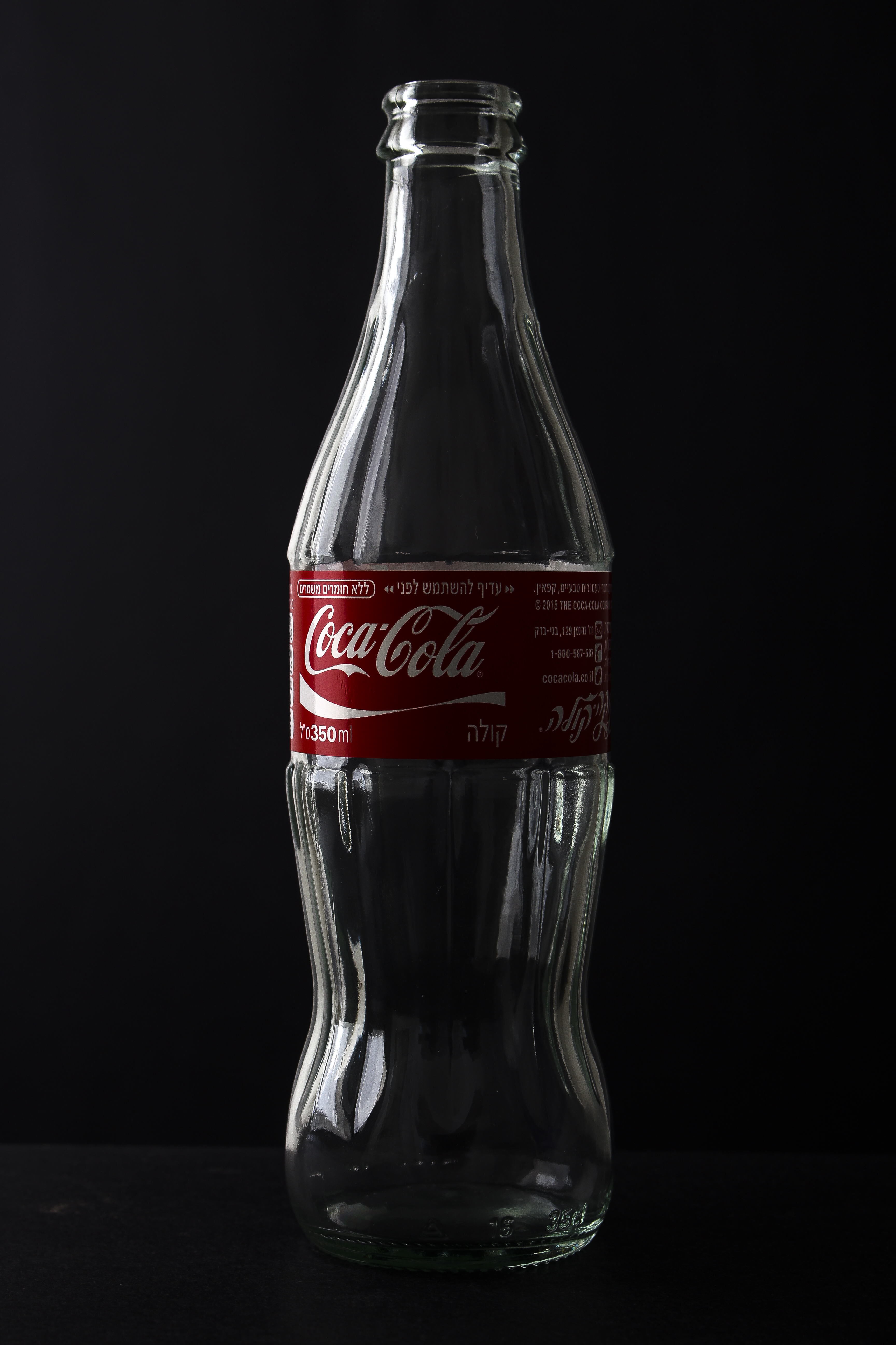 בקבוק זכוכית של קולה מחברת קוקה קולה